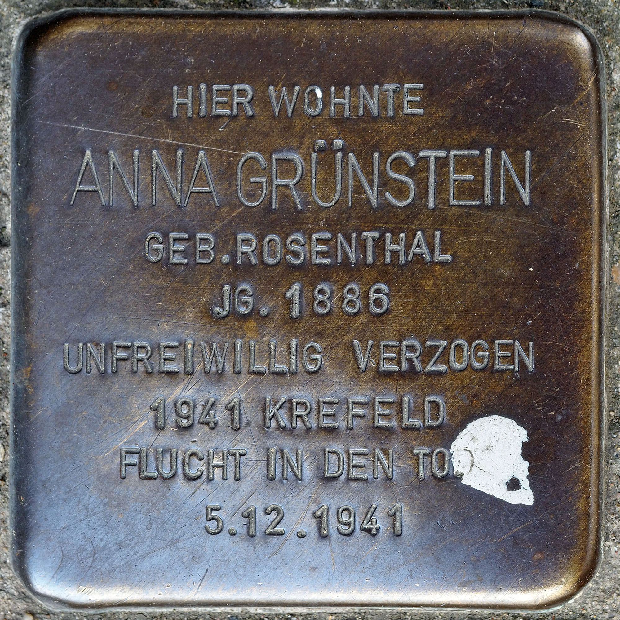 Stolpersteine MG: Grünstein, Anna